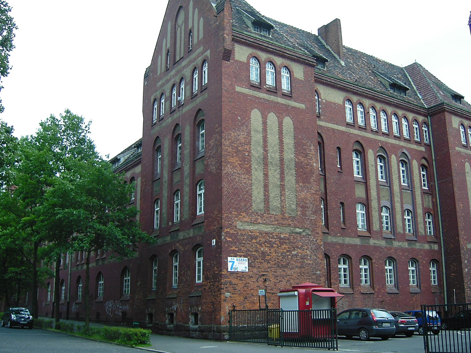 Dawne koszary KBW w Szczecinie. Budynek nr 4